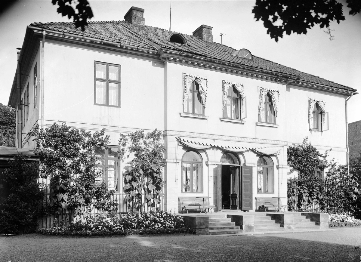 Bervens løkke, Observatoriegata 2. Revet sommeren 1940.